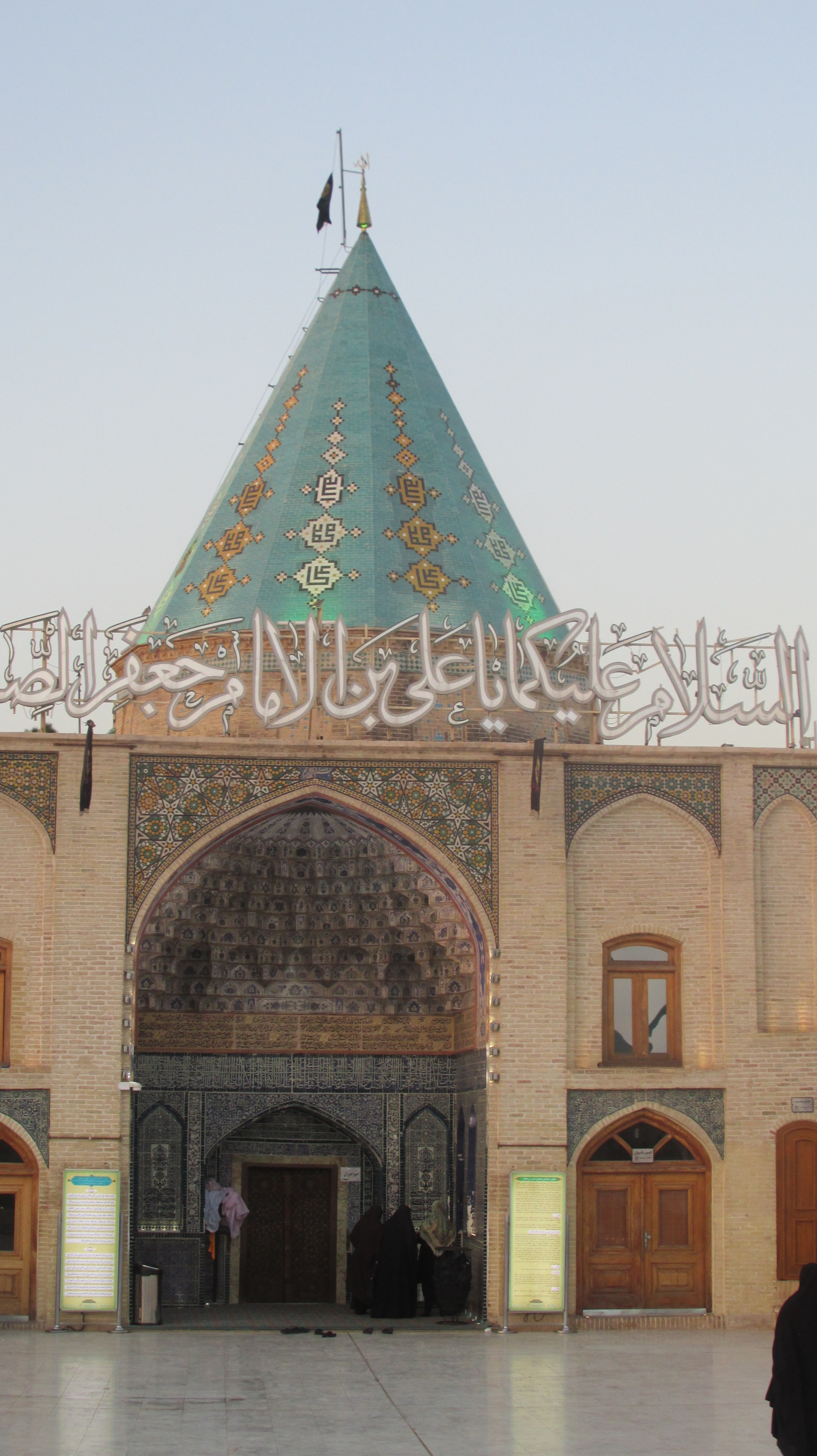 امامزاده علی بن جعفر